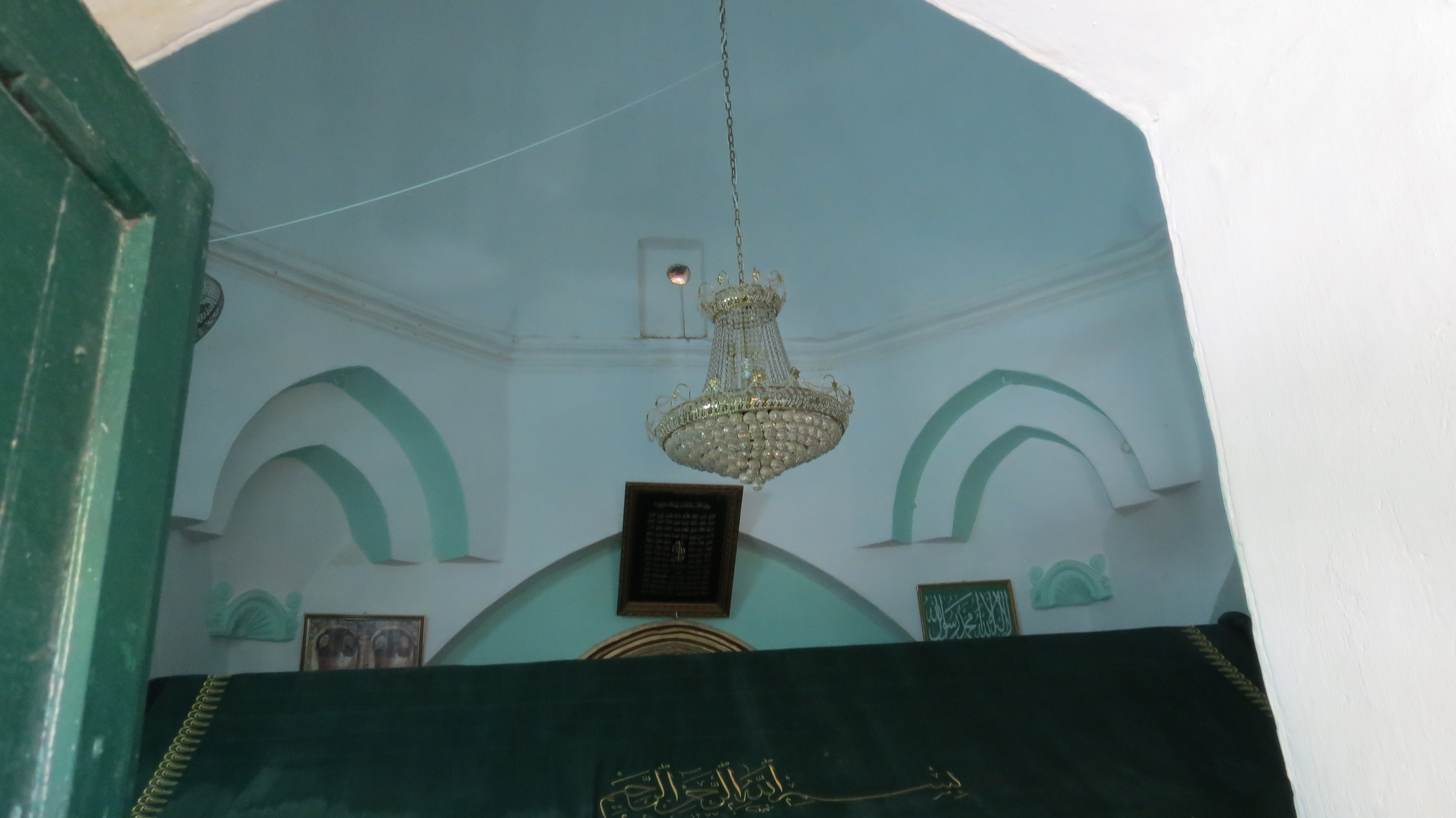 Nabi Musa נבי מוסא